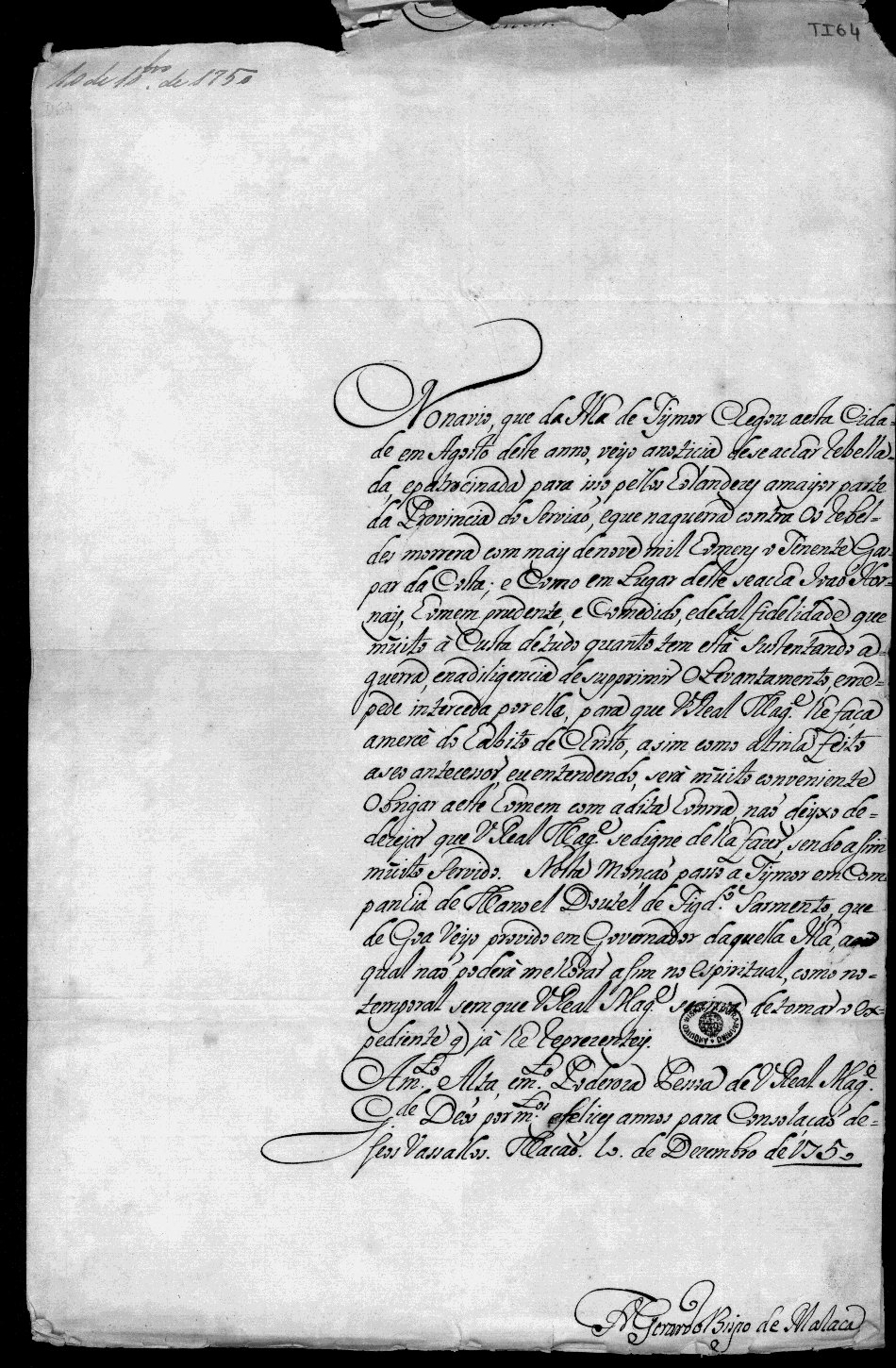 Carta do Bispo de Malaca, D. frei Gerardo [de São José] ao rei [D. José] sobre a rebelião na província de Servião e morte do tenente-general Gaspar da Costa e a mercê do Hábito de Cristo para o tenente-general João Hornay. Refere que viajará para Timor em companhia do novo governador Manuel Doutel de Figueiredo Sarmento.